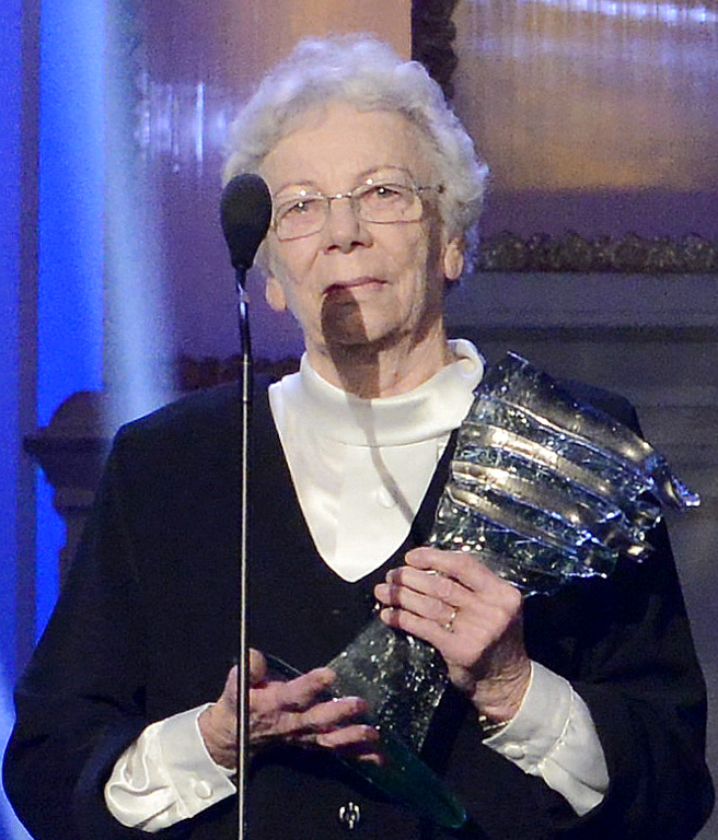 Dorota Pospíšilová